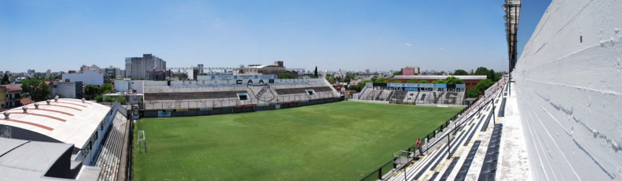 Panorama del Estadio Islas Malvinas número 2.